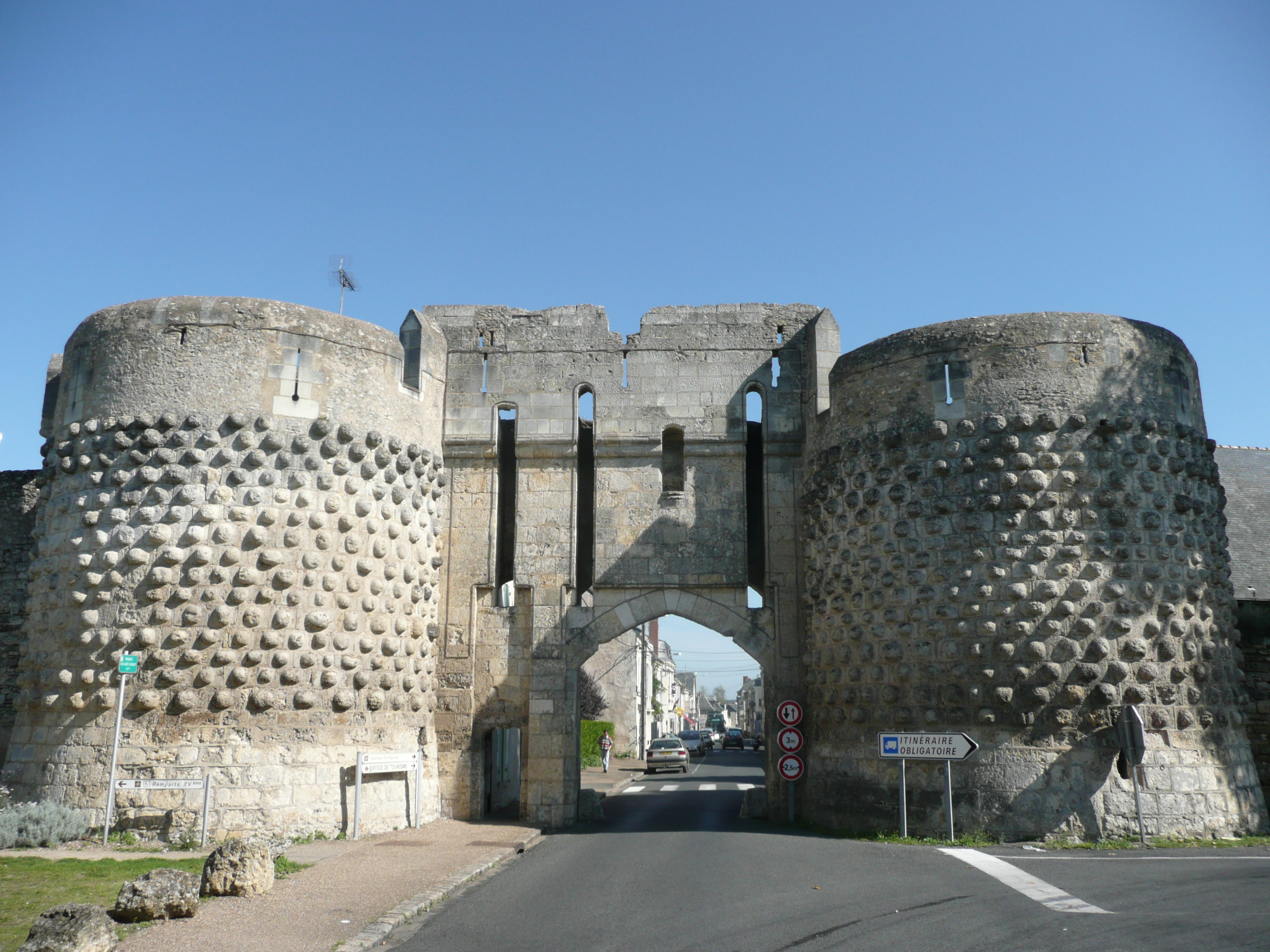 Montreuil Bellay - Fortifications - Porte Saint-Jean.